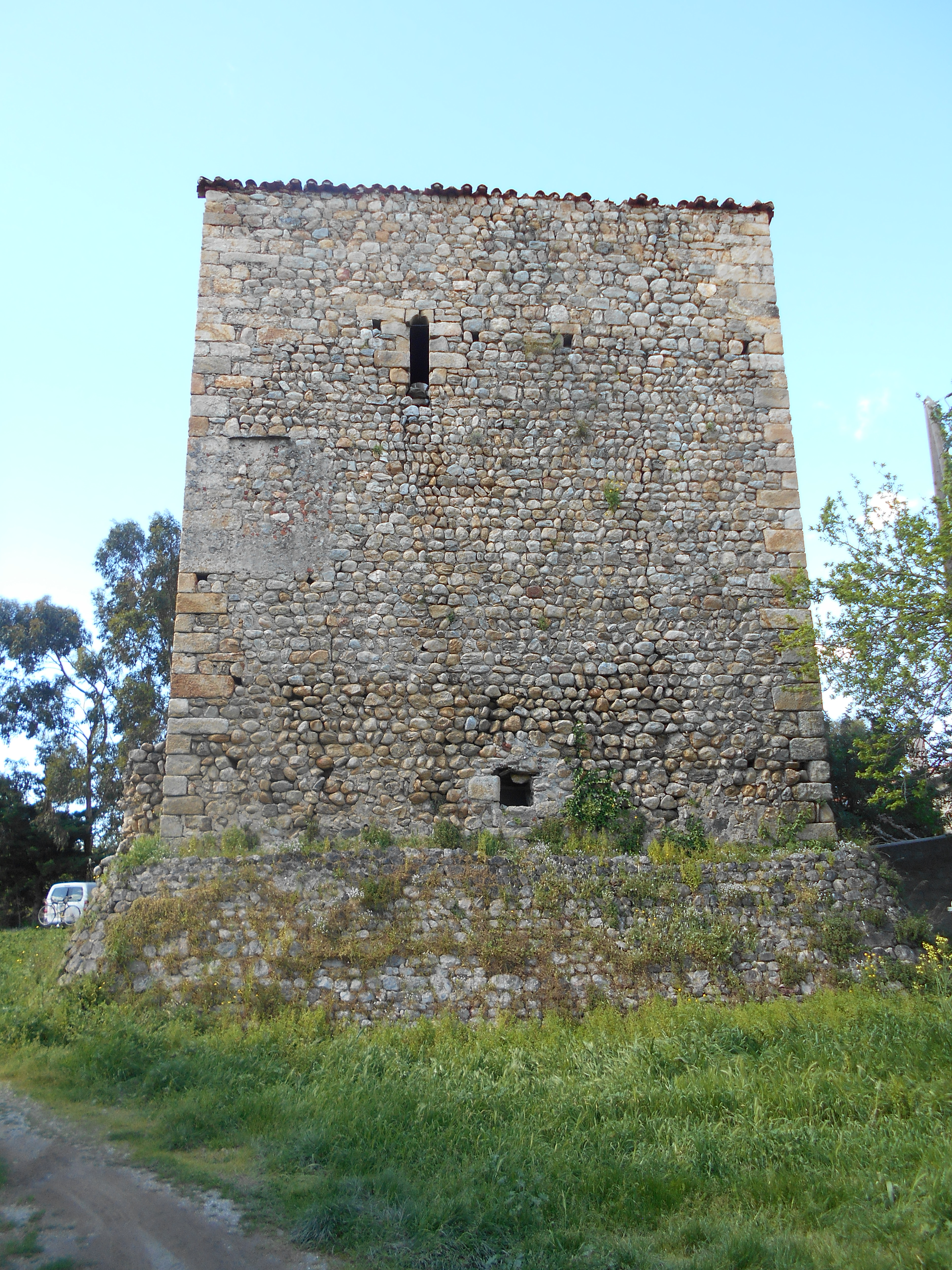 Torre de l'Homenatge del Castell de Pujols. Cara est